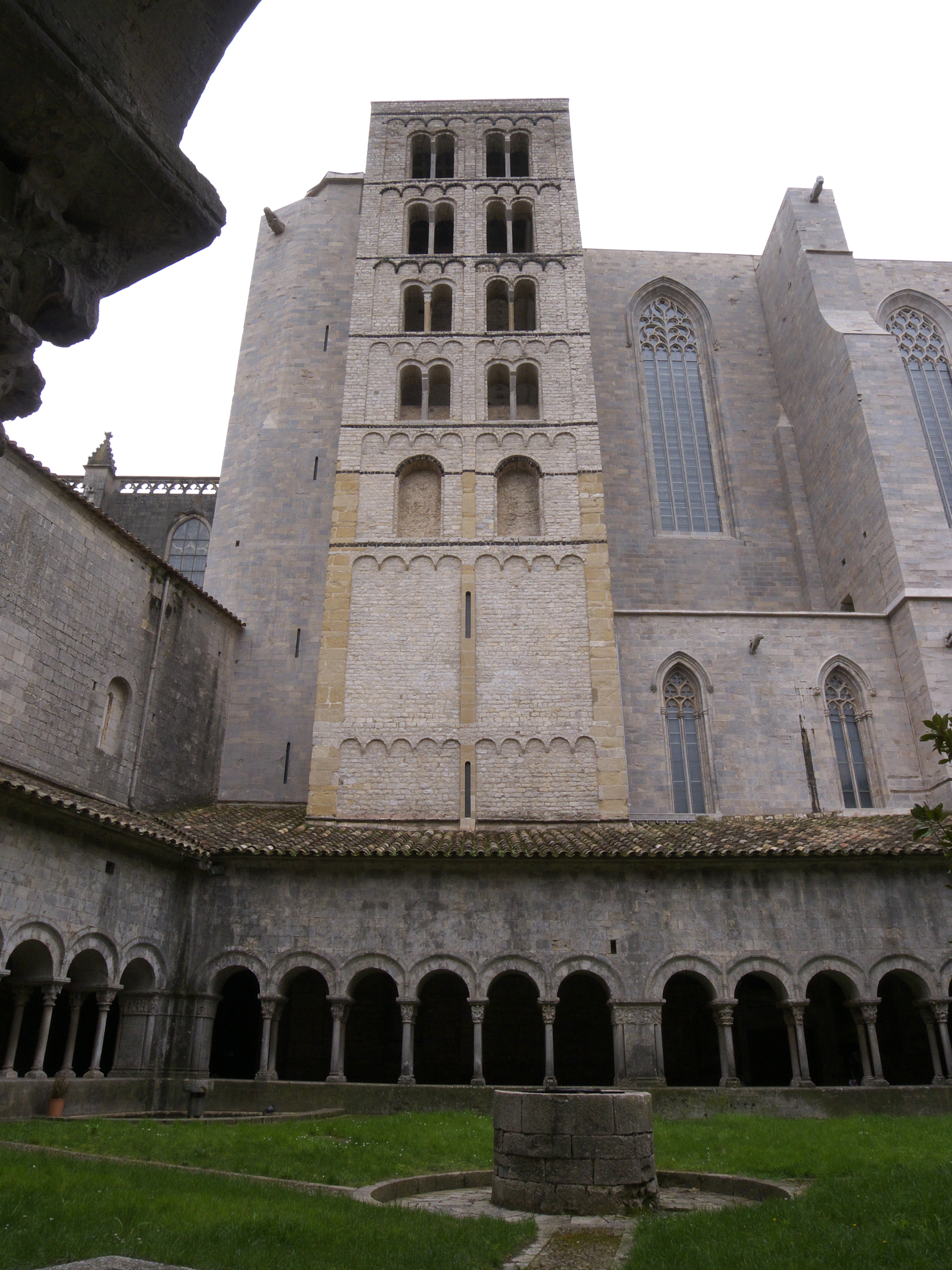 Catedral de Gerona. Primitiva torre de la catedral románica incorporada a la nueva fábrica gótica como contrafuerte.